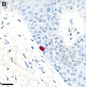 Figura 2. Características inmunohistoquímicas y ultraestructurales de las células fisiológicas de Merkel. B) La tinción inmunohistoquímica de la piel normal reveló una célula de Merkel localizada en el infundíbulo de un folículo piloso, coexpresando citoqueratina 20 citoplasmática (en rojo) y SATB2 nuclear (en marrón). Barra de escala A=100 μm y para B=50 μm.